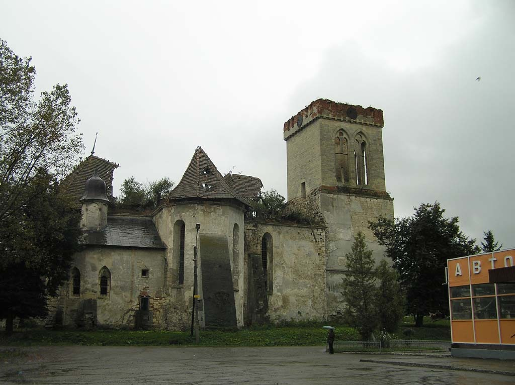 Zrujnowany kościół w Podhajcach